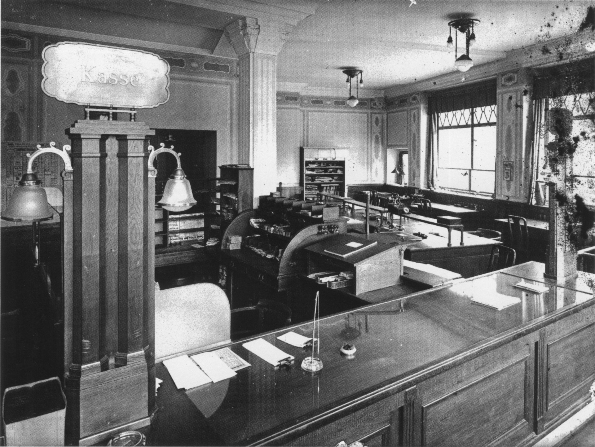 Kassenraum der Commerz- und Privatbank in der Wasserturmstraße 1, um 1925. Die Bank wurde 1870 als Hamburger Commerz- und Diskonto-Bank auf Initiative des Kaufmanns Theodor Wille gegründet.